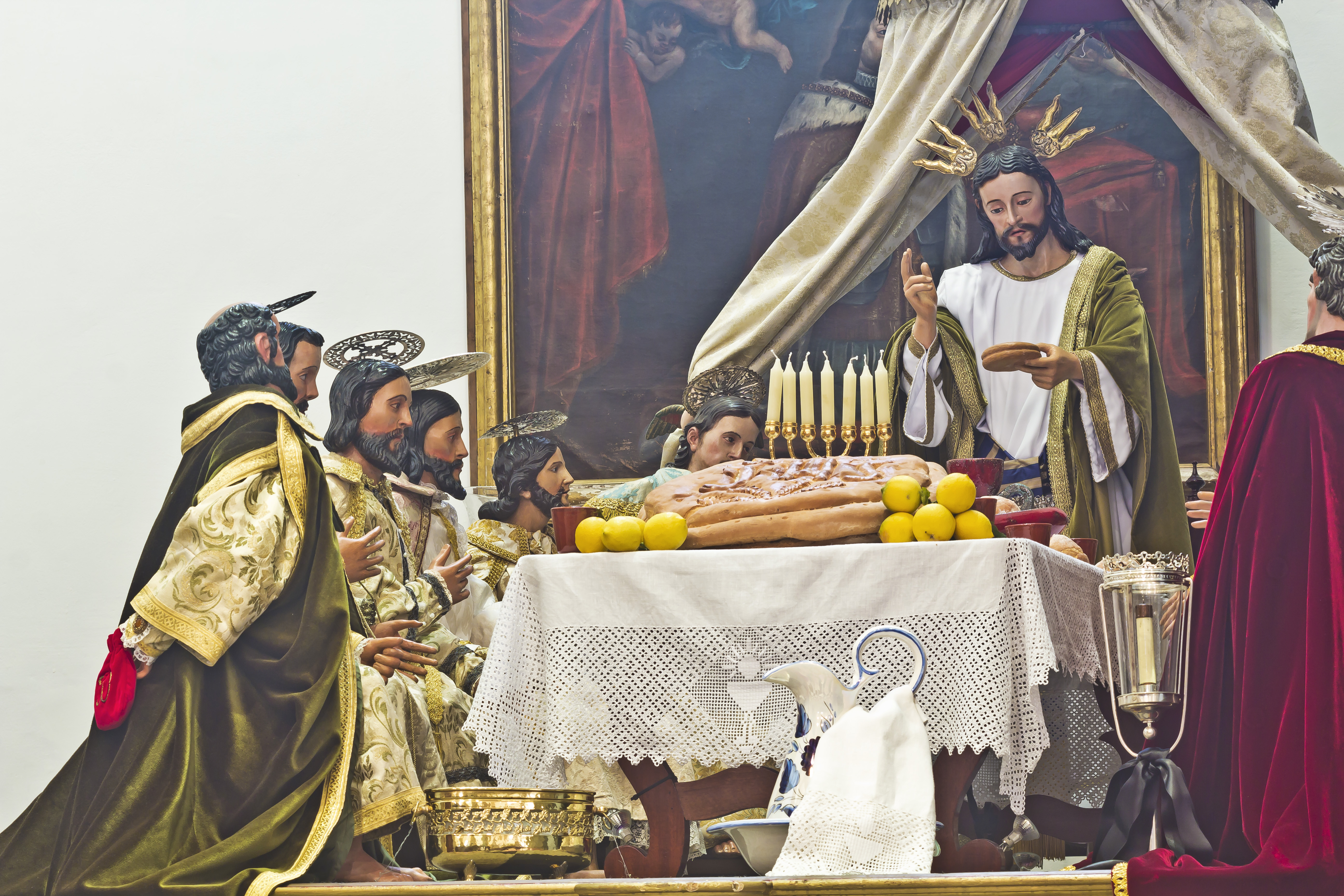 Paso de la última cena